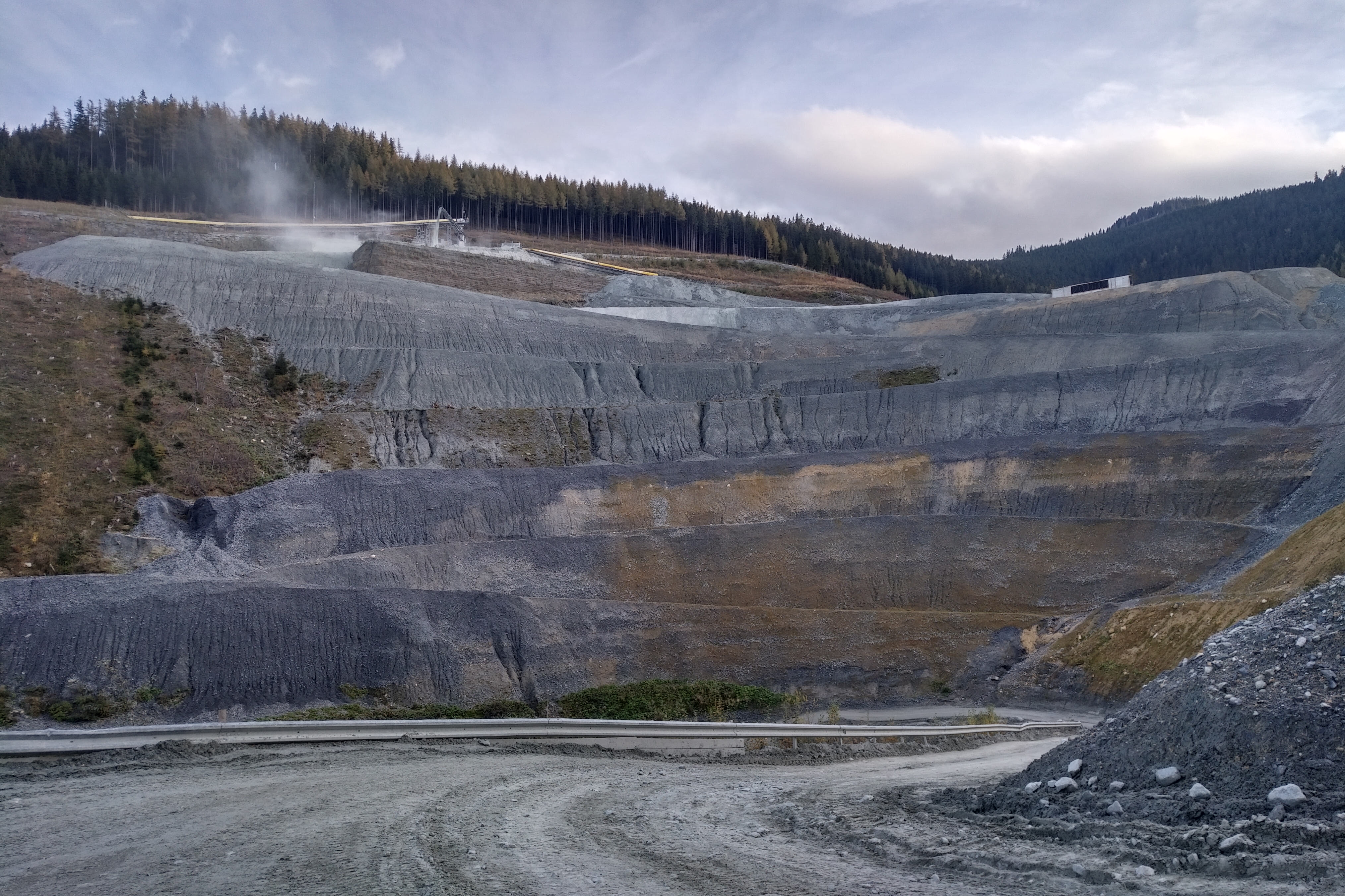 Aufschüttung in der Deponie Longsgraben